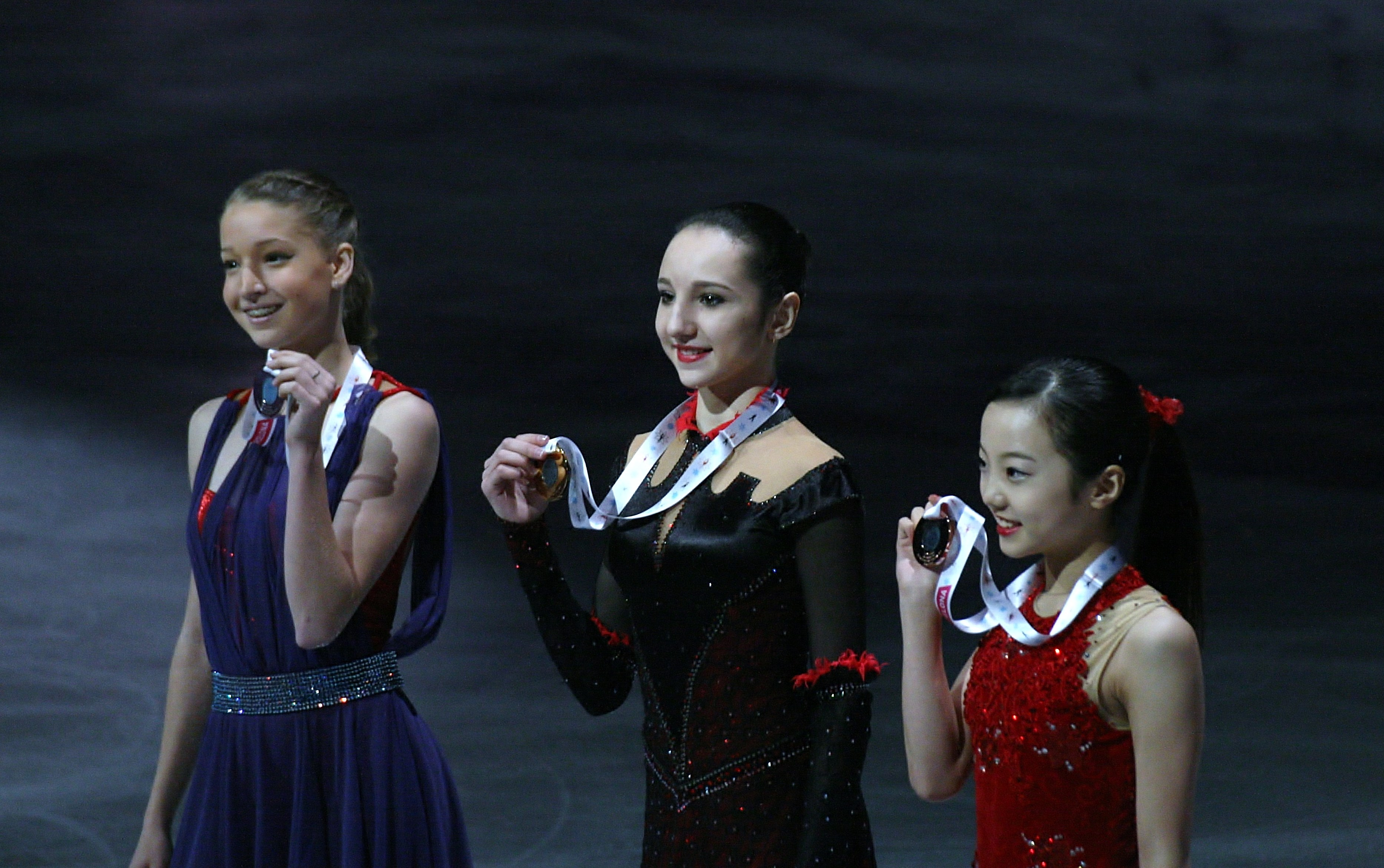 Церемония награждения девушек (юниоры) на Финале Гран-при по фигурному катанию 2015-2016. Слева на право: Мария Сотскова (Россия) - 2е место, Полина Цурская (Россия) - 1е место, Марин Хонда (Япония) - 3е место.